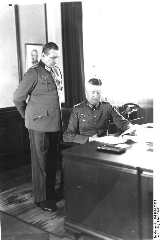 Oberst Haseloff und General Friedrich Fromm ADN-ZB 8.4.1940 General der Artillerie Friedrich Fromm, Chef des Ersatzheeres und Stabschef Oberst Haseloff, (stehend). [Oberst Kurt Haseloff (?) und General Friedrich Fromm] Abgebildete Personen: Fromm, Friedrich: Generaloberst, Ritterkreuz (RK), Heer, Deutschland (PND 118843338) Haseloff: Oberst, Heer, Deutschland